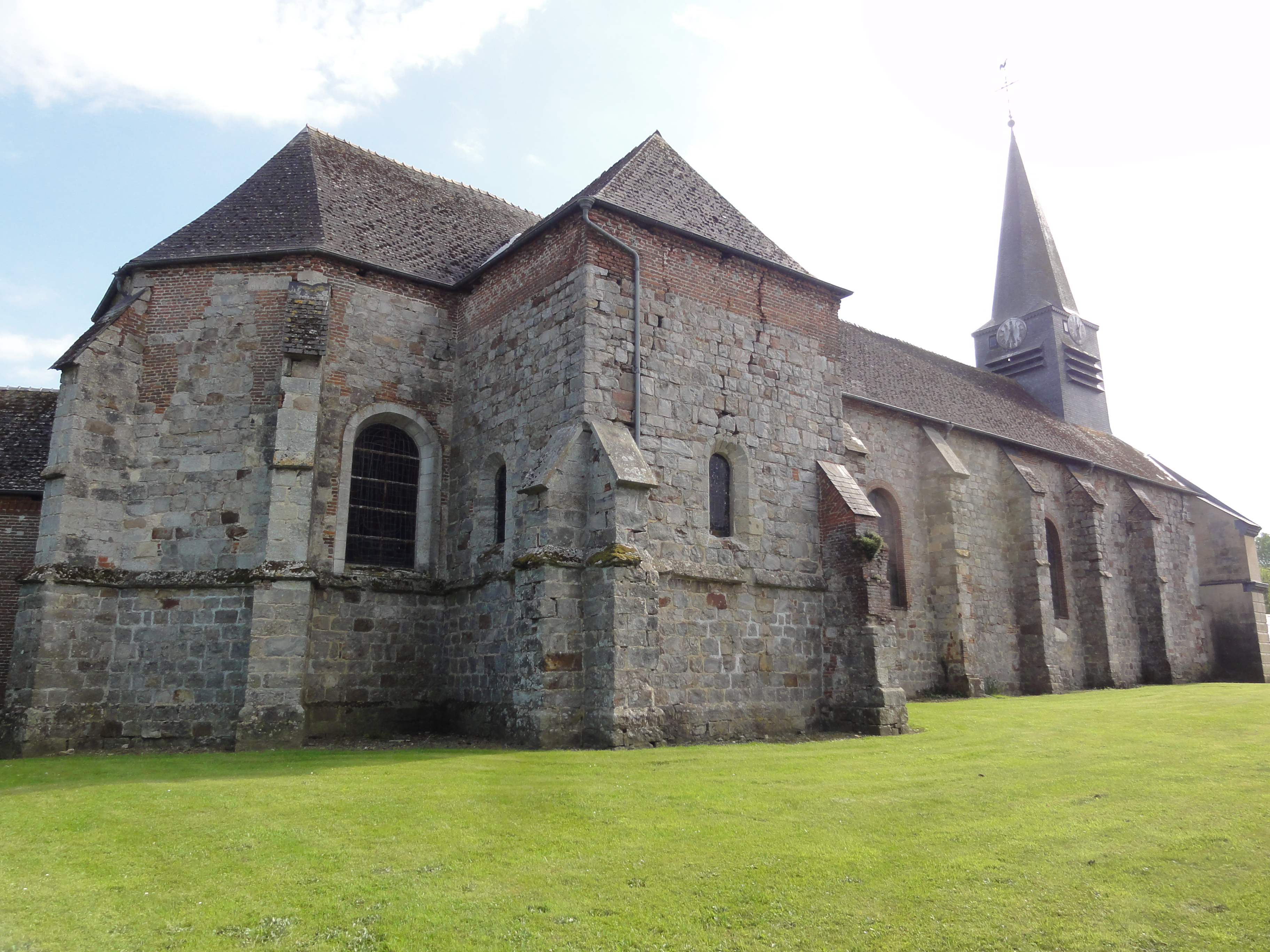 Landouzy-la-Ville (Aisne) église